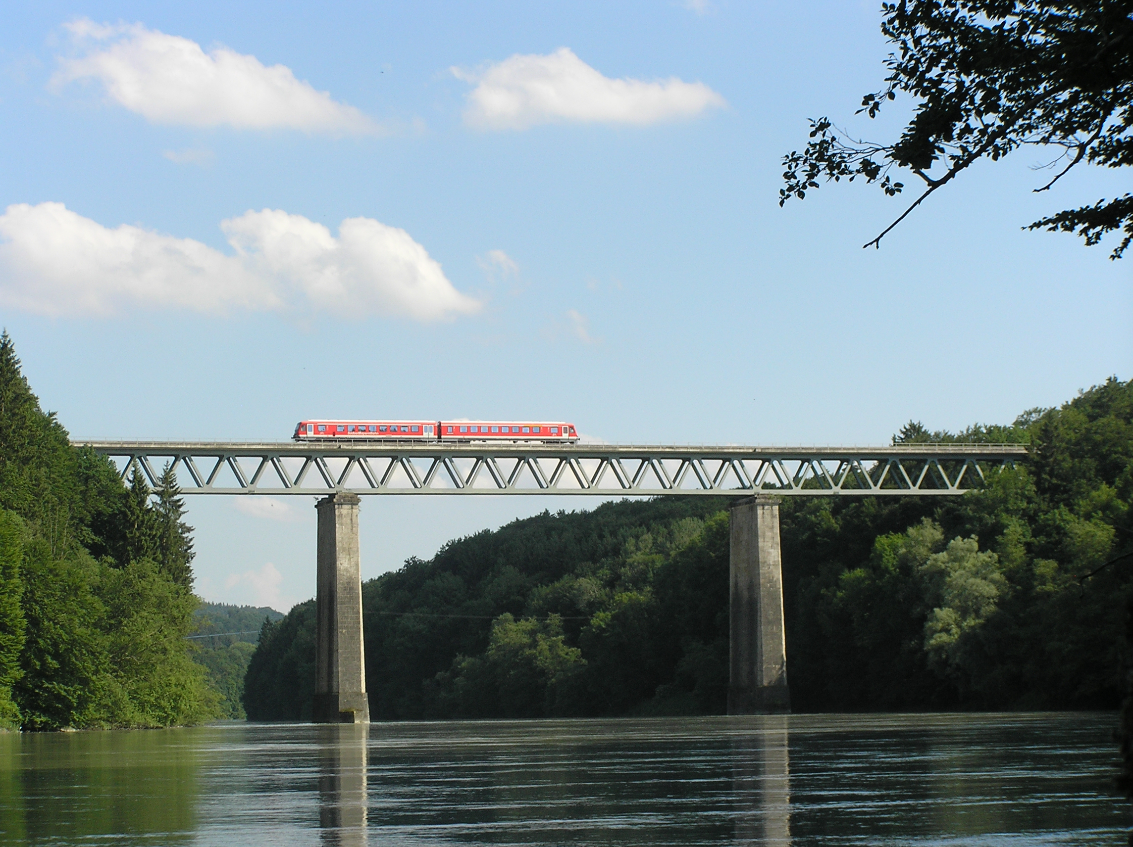 Innbrücke bei Königswart mit einem VT628-Triebwagen der Südostbayernbahn